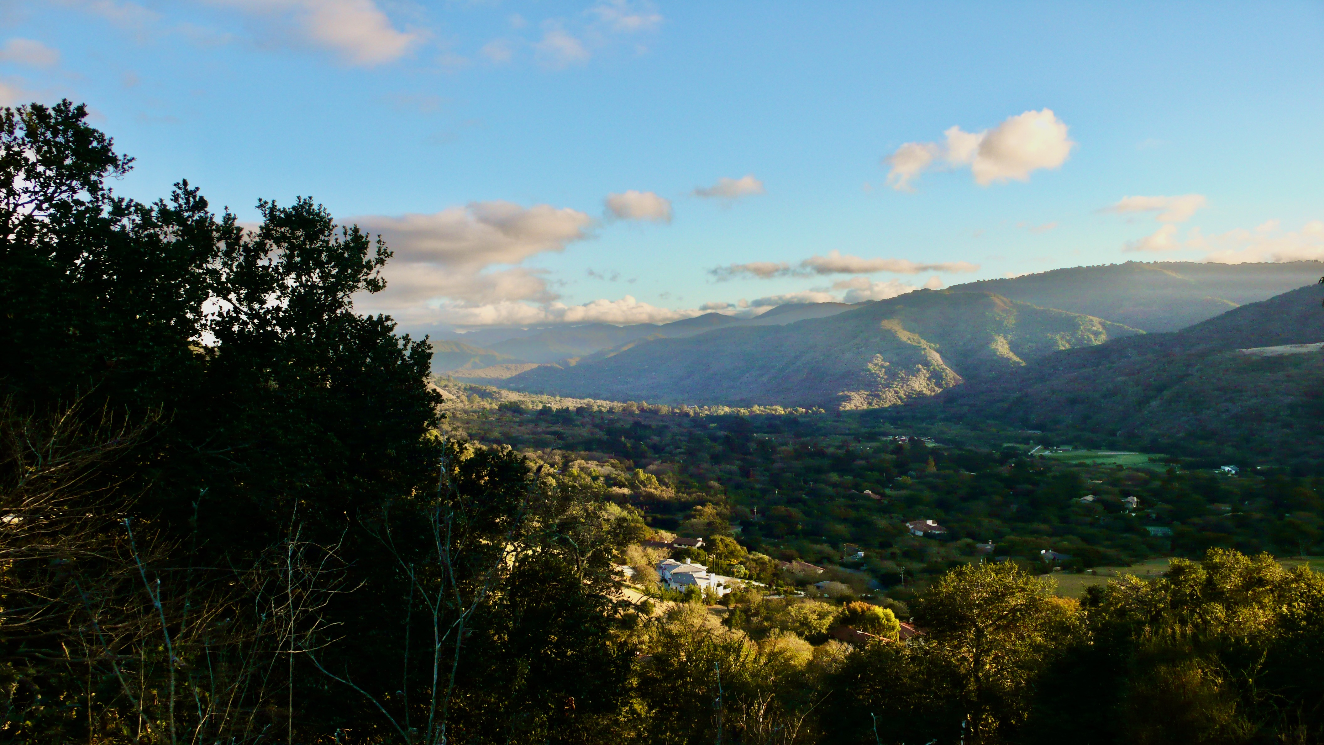 Carmel Valley